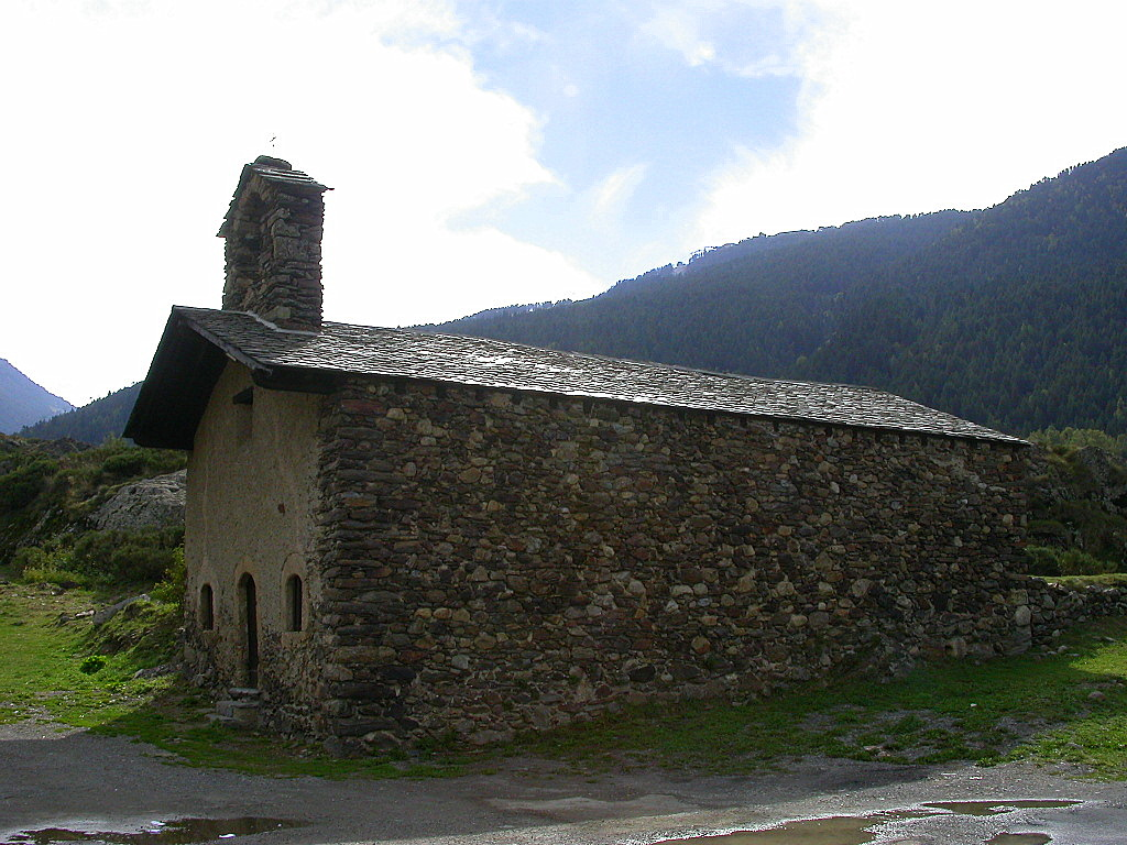 Església de Sant Pere del Tarter